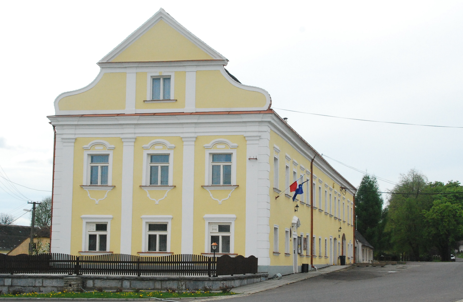 Gemeindeamt und Feuerwehrhaus von Vratěnín, früher Poststation